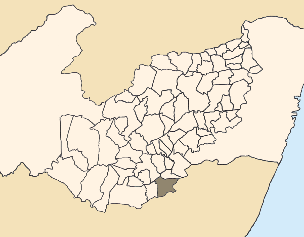 Mapa da mesorregião Agreste de Pernambuco (Brasil) subdivida em municípios. Em destaque, o município de Correntes. Map of the brazilian state of Pernambuco (mesorregião Agreste) showing the city of Correntes. Imagem tratada com o GIMP. Image made with GIMP.